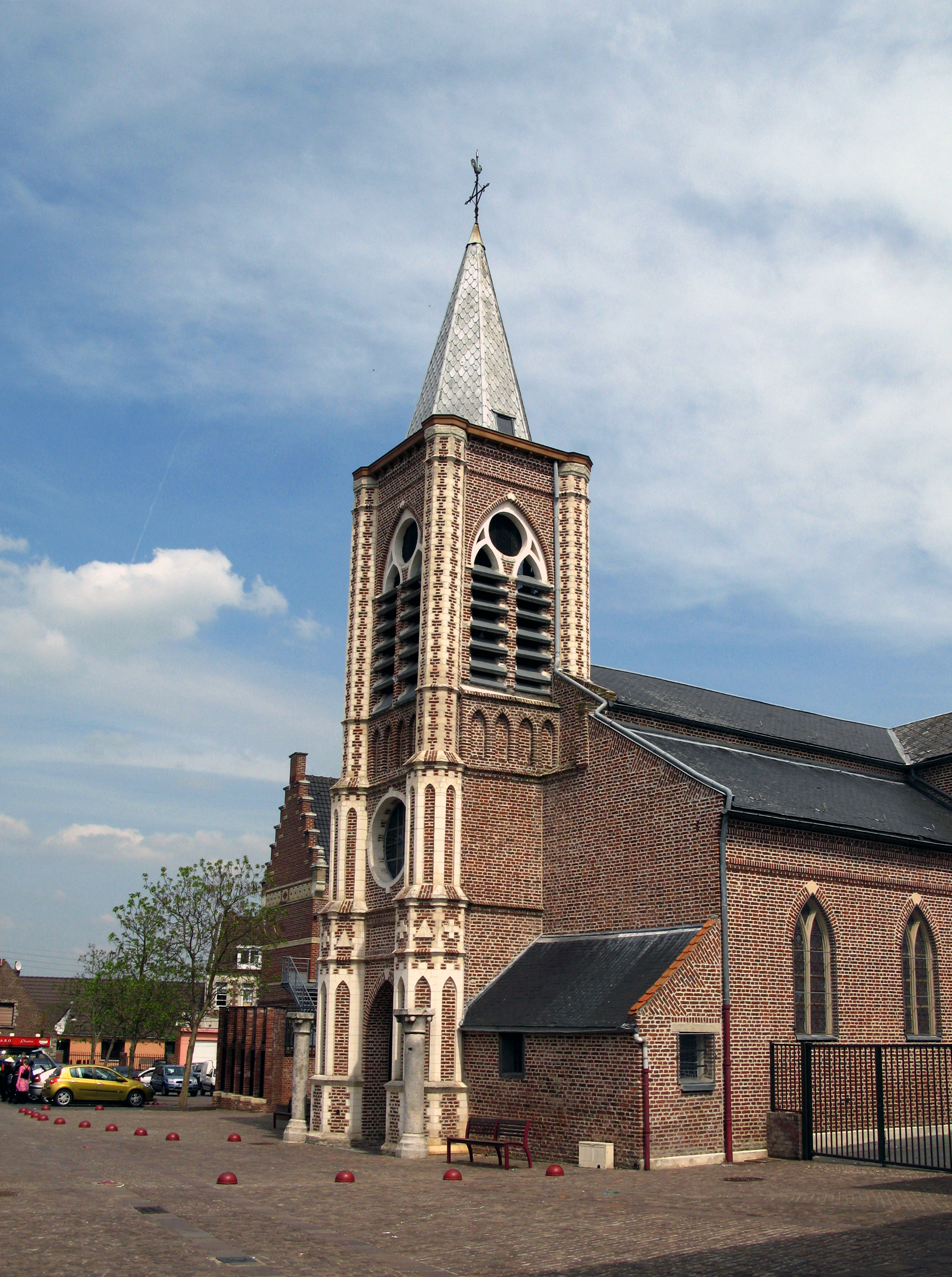 Guesnain (Nord, France) - L'église. En brique et pierre, l'édifice a son portail encadré par 2 fûts de colonnes surmontés d'un chapiteau, vestiges anciens dressés sans être intégrés à la construction actuelle.